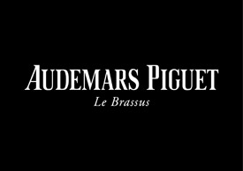 Audemars Piguet company logo